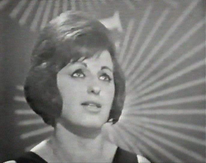 Eurovision Song Contest 1965 Regia di ROMOLO SIENA Allestimento scenografico di FRANCESCO DE MARTINO Luci di GUIDO CARACCIOLO Assistente alla regia ELENA AMICUCCI Assistente di studio MARCELLO SABETTI Capo stuadra tecnica ANGELO FONTANA Prima controllo camere GUSTAVO GALLARATO Capo tecnico audio CIRO PALLONETTO Cameramen ADOLFO BOTTA, SERGIO FREISSENET, ENRICO LANDINI, FLORIDO VARZI ________________________________ Ulla Wiesner